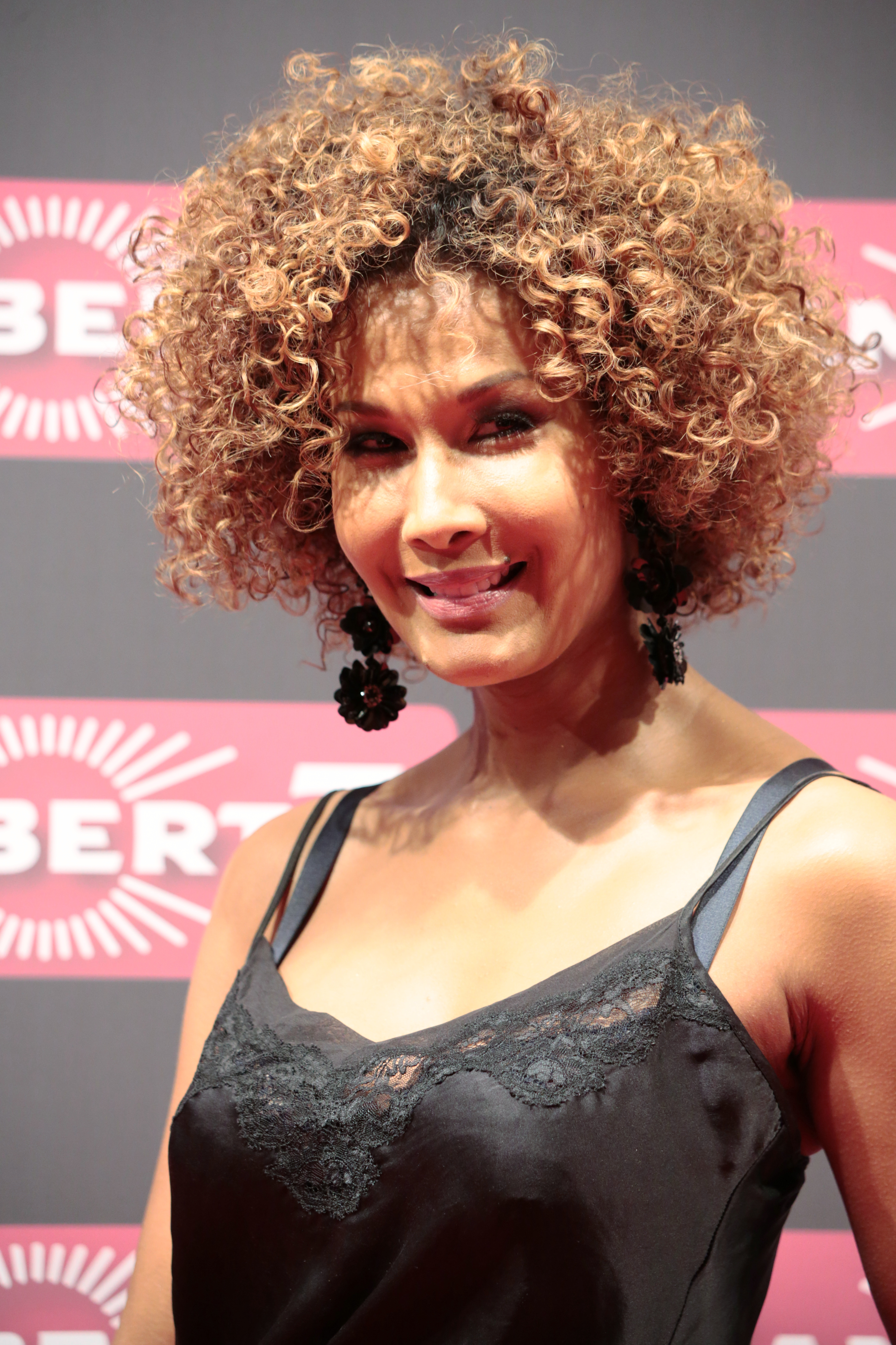 Marie Amière bei der Lambertz Monday Night 2018.